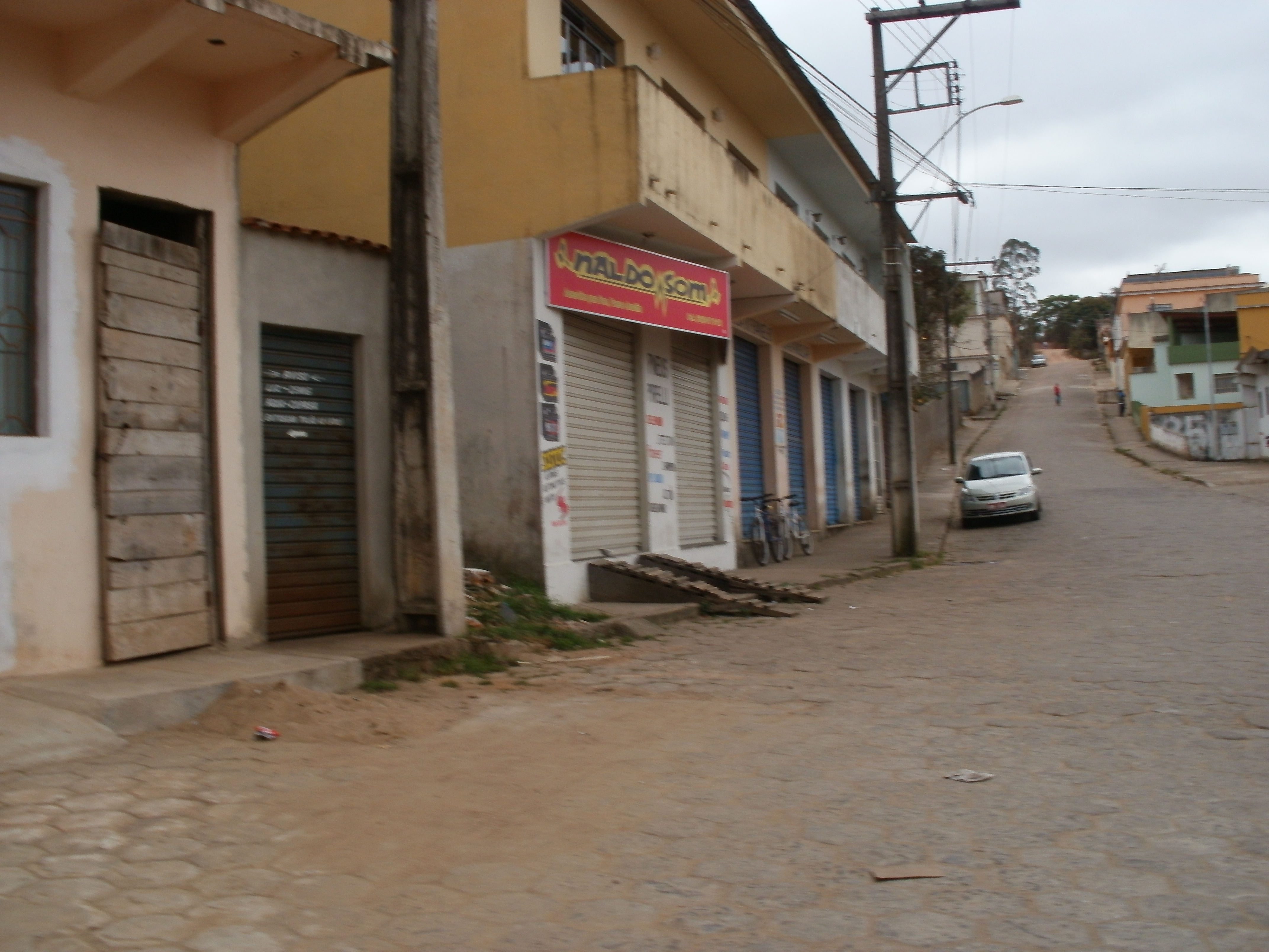 Vista de casas, estabelecimentos comerciais e de uma rua em Bom Jardim de Minas-MG, Brasil.